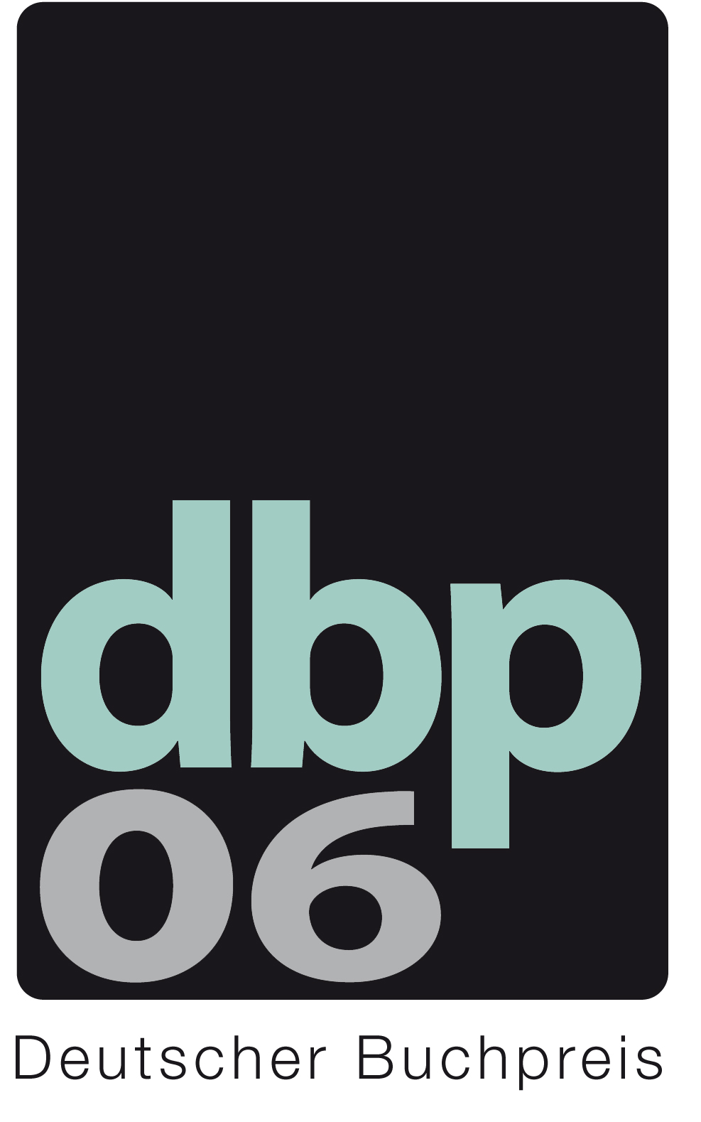 Logo Deutscher Buchpreis 2006